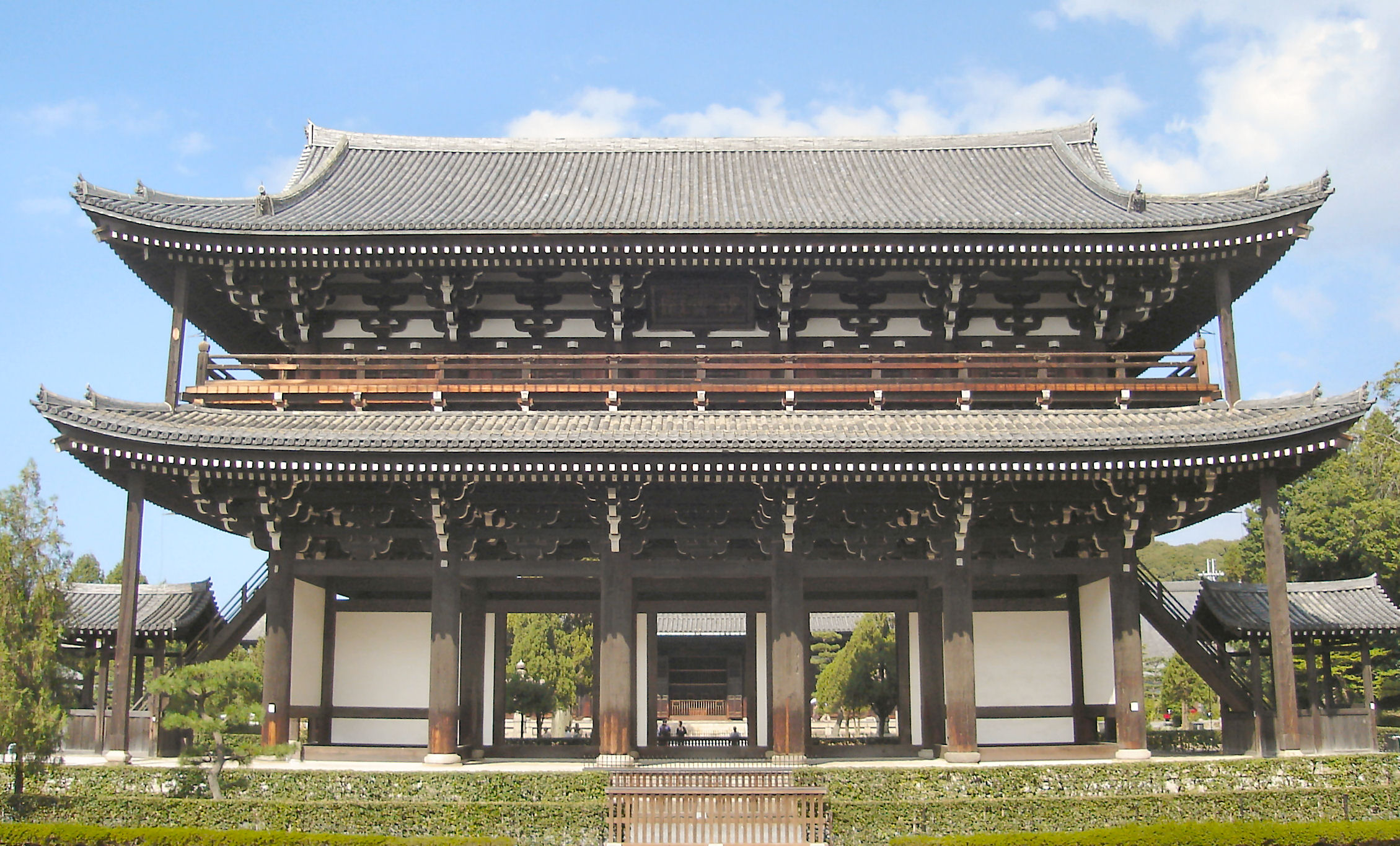 Tofukuji Sanmon (東福寺 三門)